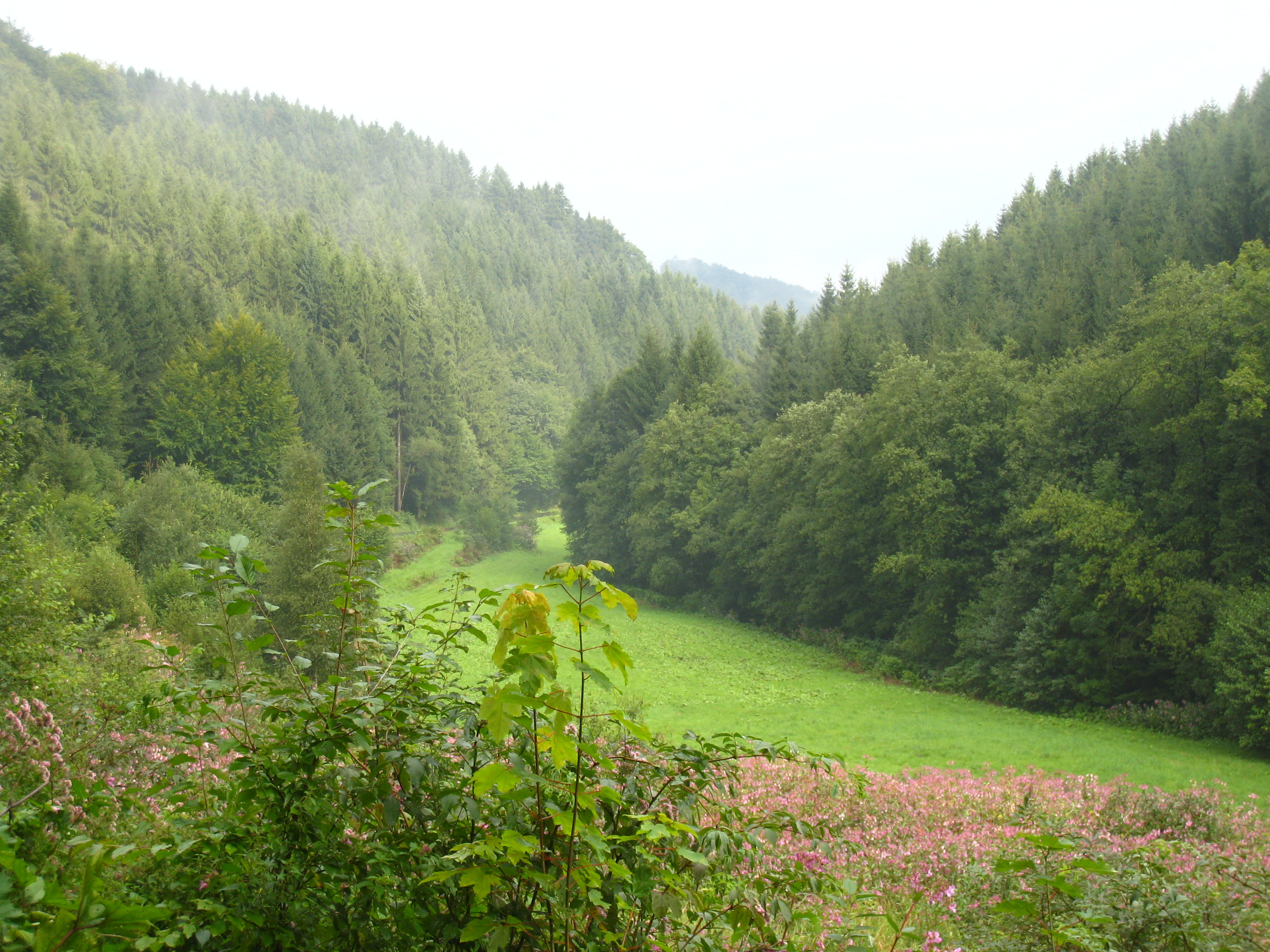 Das Nahmerbachtal im Märkischen Kreis